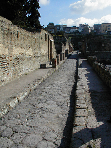 רחוב בעיר. רחוב בהרקולנאום.